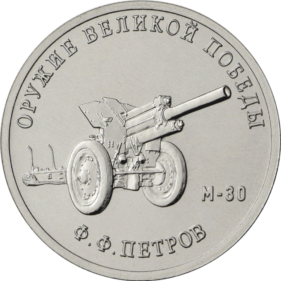 Монета Банка России. 25 рублей, реверс, анциркулейтед. Медно-никелевый сплав. Серия «Оружие Великой Победы (конструкторы оружия)». Конструктор оружия Ф.Ф. Петров, гаубица М-30. Рельефное изображение гаубицы М-30, справа – надпись «М-30»; вдоль канта – надписи, вверху: «ОРУЖИЕ ВЕЛИКОЙ ПОБЕДЫ», внизу: «Ф.Ф. ПЕТРОВ». Художник: А.В. Гнидин. Скульптор: А.Н. Бессонов. Московский монетный двор.